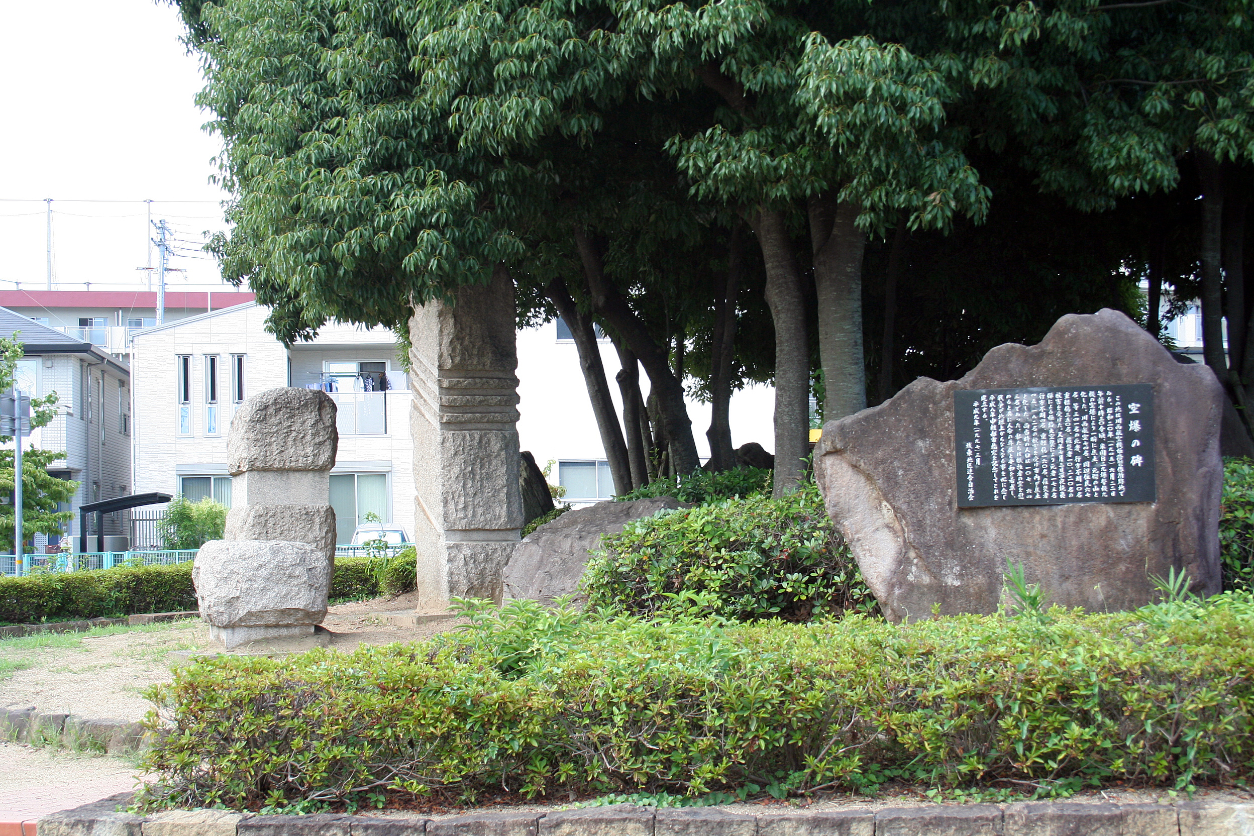 京口駅。播但線の鉄道駅。 駅の東側にある空爆の碑。第二次世界大戦中にこの辺りが空襲されたことを悼むために作られた記念碑がある。